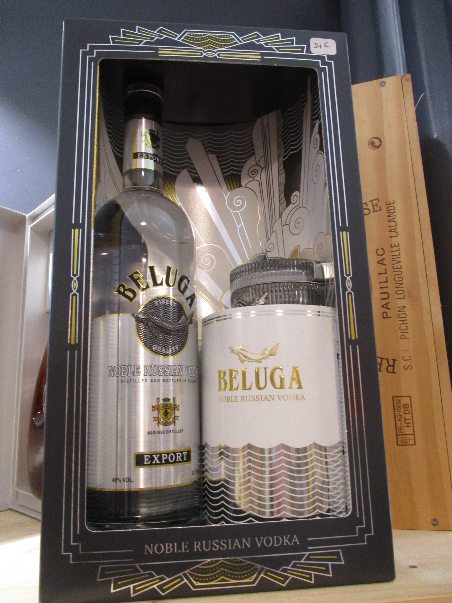 Caviar et Vodka russe Beluga